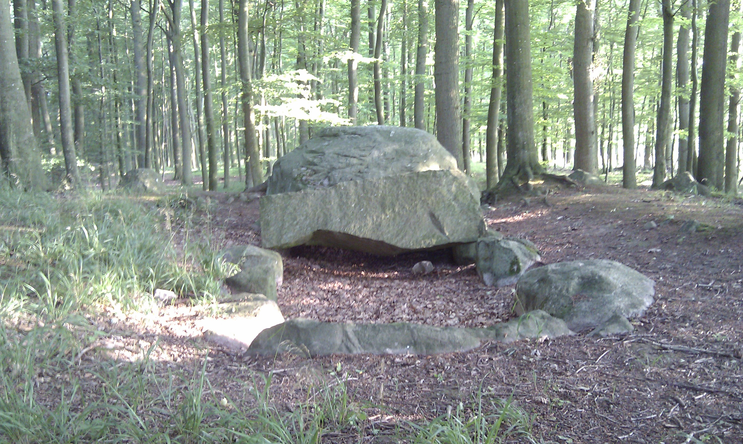 Poggendorfer Forst Großdolmen 3 vom Schlußstein aus gesehen